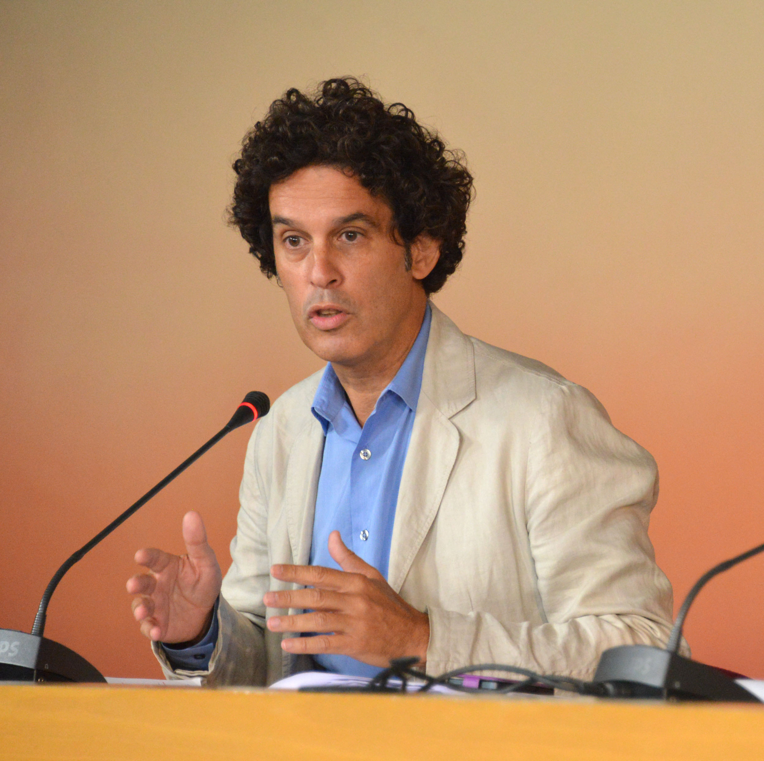 El portavoz del PSOE en el Ayuntamiento de Madrid, Jaime Lissavetzky, ha comparecido ante los medios junto a los ediles Pedro Zerolo, Noelia Martínez, Diego Cruz y Ruth Porta para explicar las preguntas y proposiciones que presentarán el grupo municipal en el pleno del mes de septiembre.